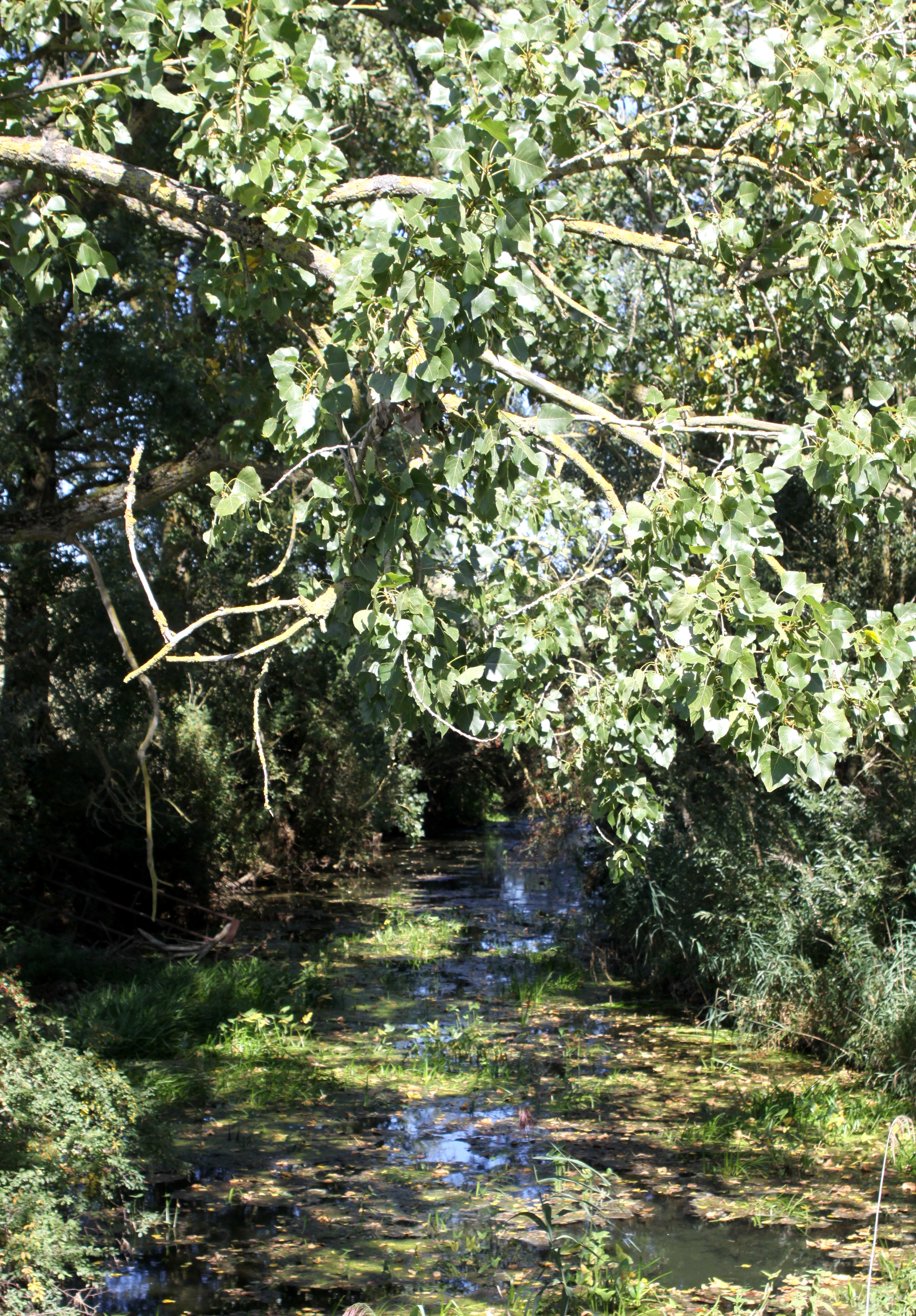 De Rupt de Mad zu Lahayville flossof gesinn